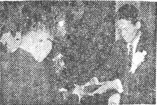 한국의 정치인 겸 언론인 장준하